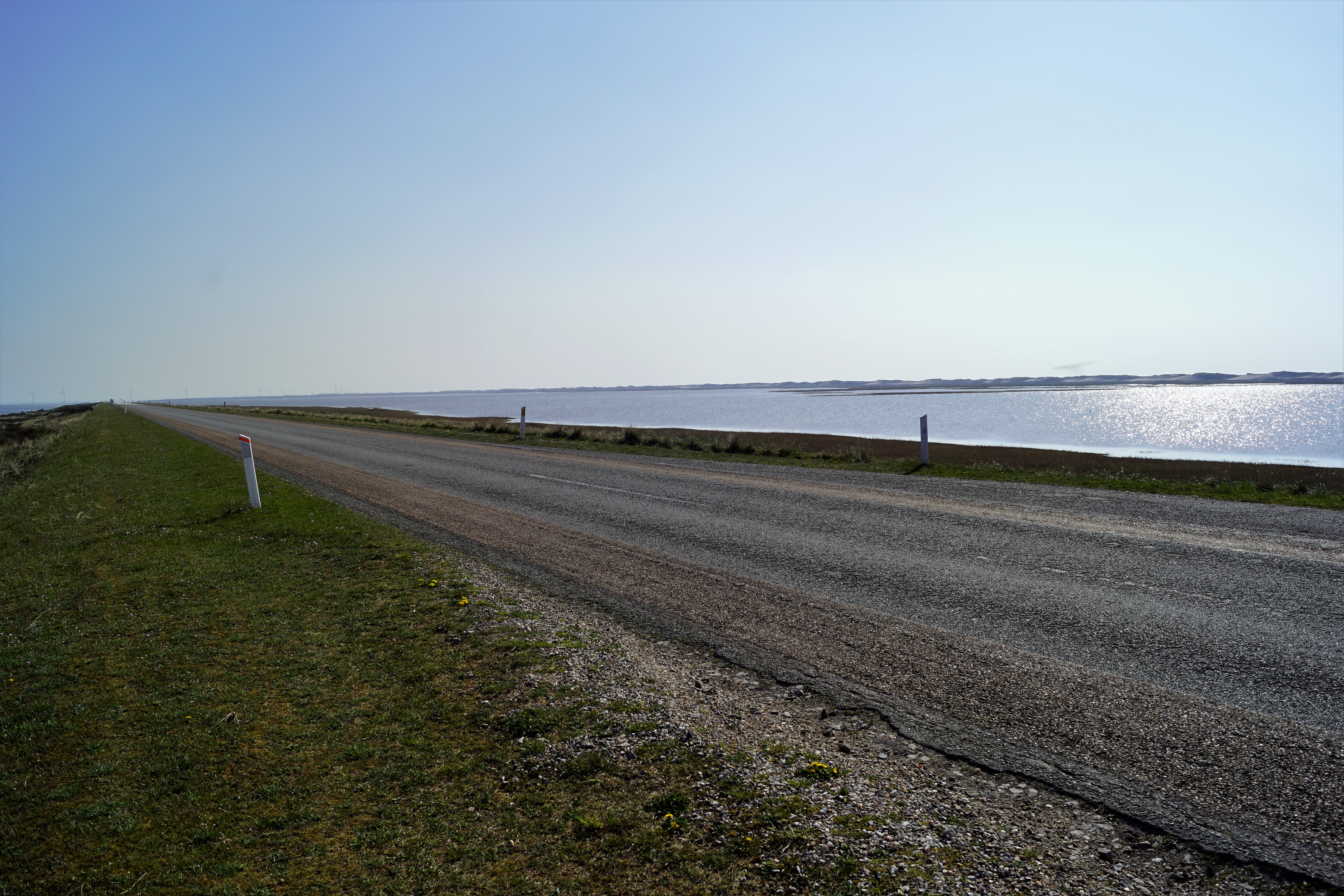 Nordenden af Aggertangen set fra vejdæmningen